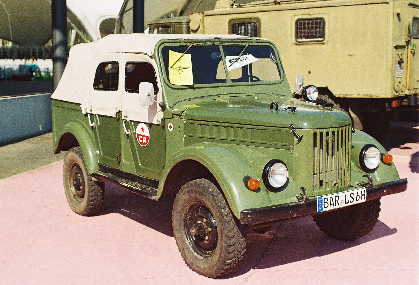 UAZ-69